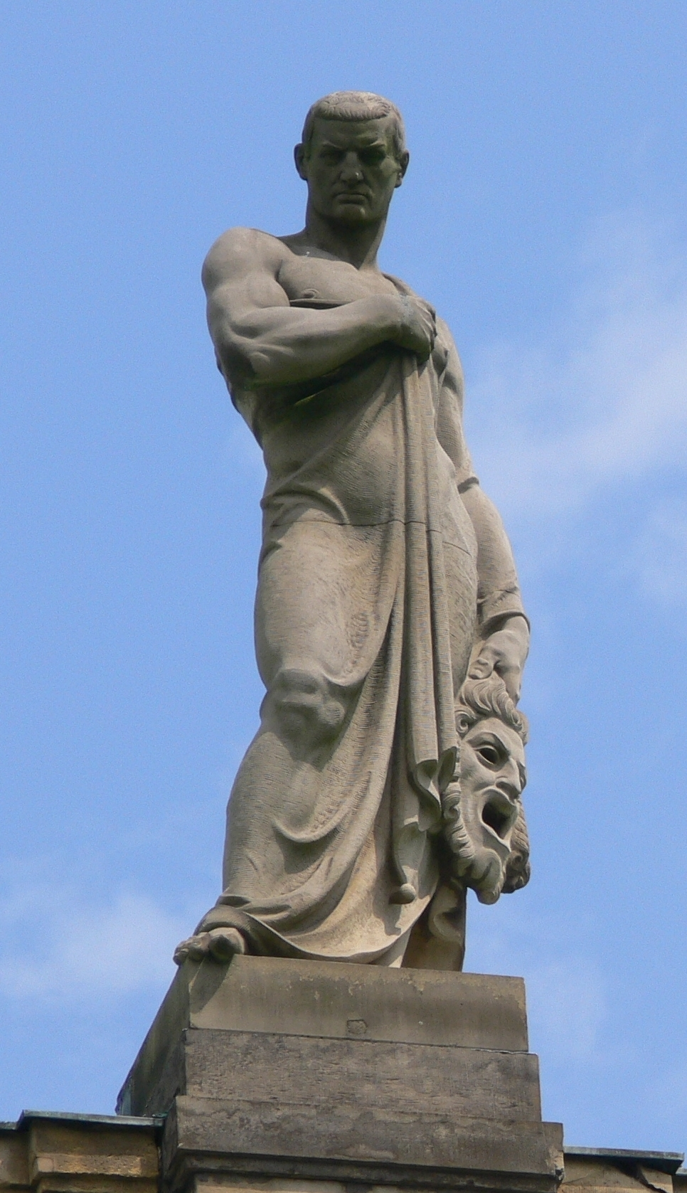 Allegorie der Schauspielkunst von Karl Gimmi, 9. Attikafigur (von links) auf dem Portikus des Großen Hauses der Staatstheater Stuttgart, 1912.